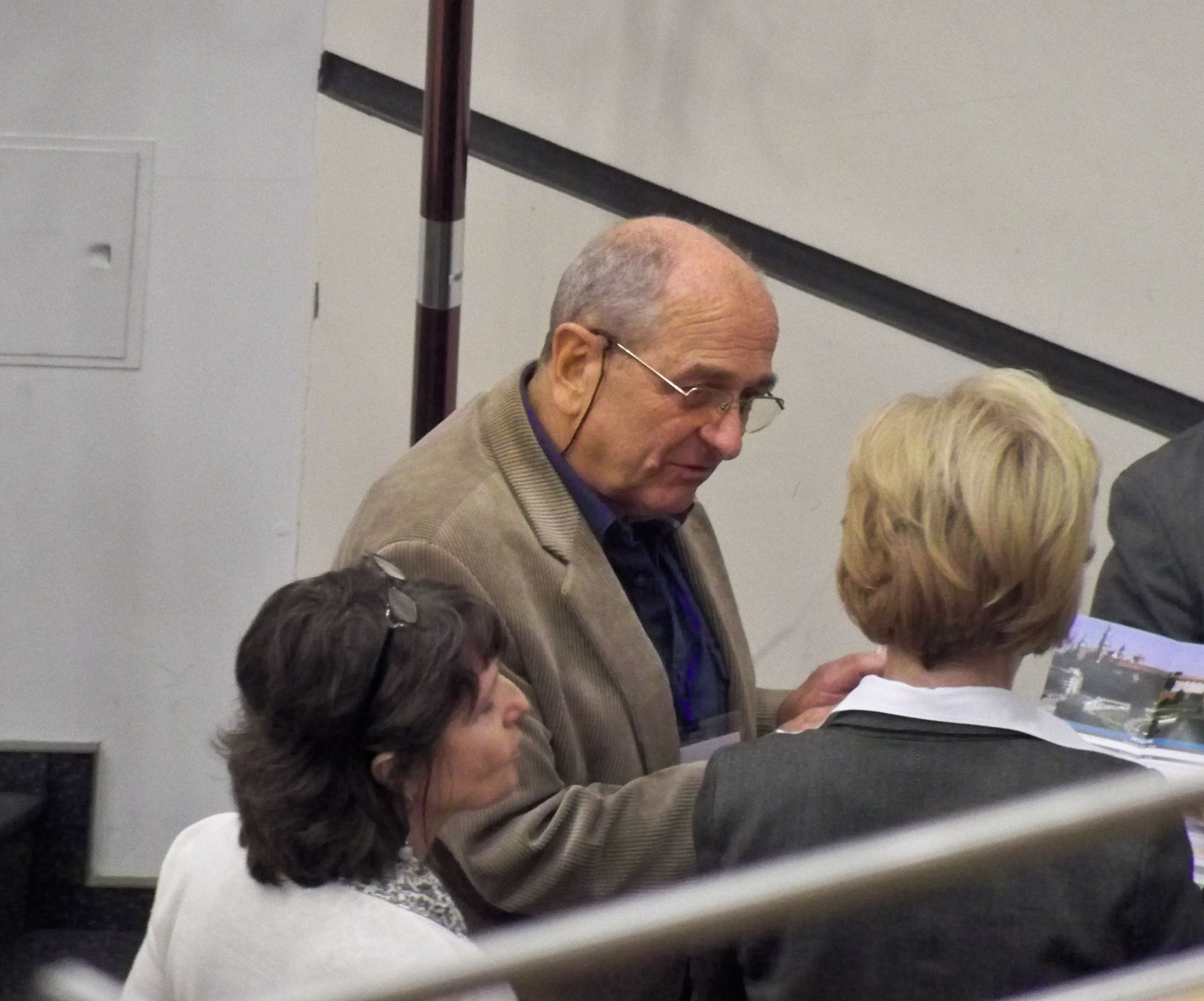 XXII Zjazd Hydrobiologów Polskich w Krakowie. W centrum Z. Maciej Gliwicz, po lewej Joanna Galas, po prawej, od tyłu, Lubomira Burchardt